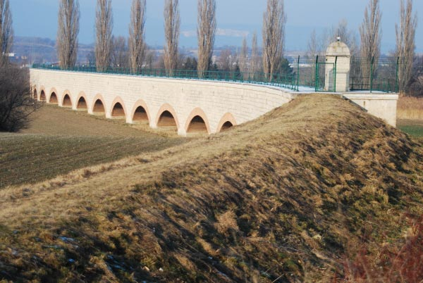 Der Aquädukt Leobersdorf der I. Wiener Hochquellenwasserleitung mit einstiegsturm 30 im Vordergrund